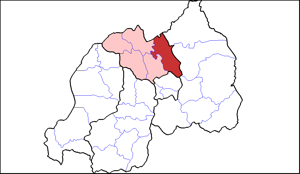 Distretto di Gicumbi.